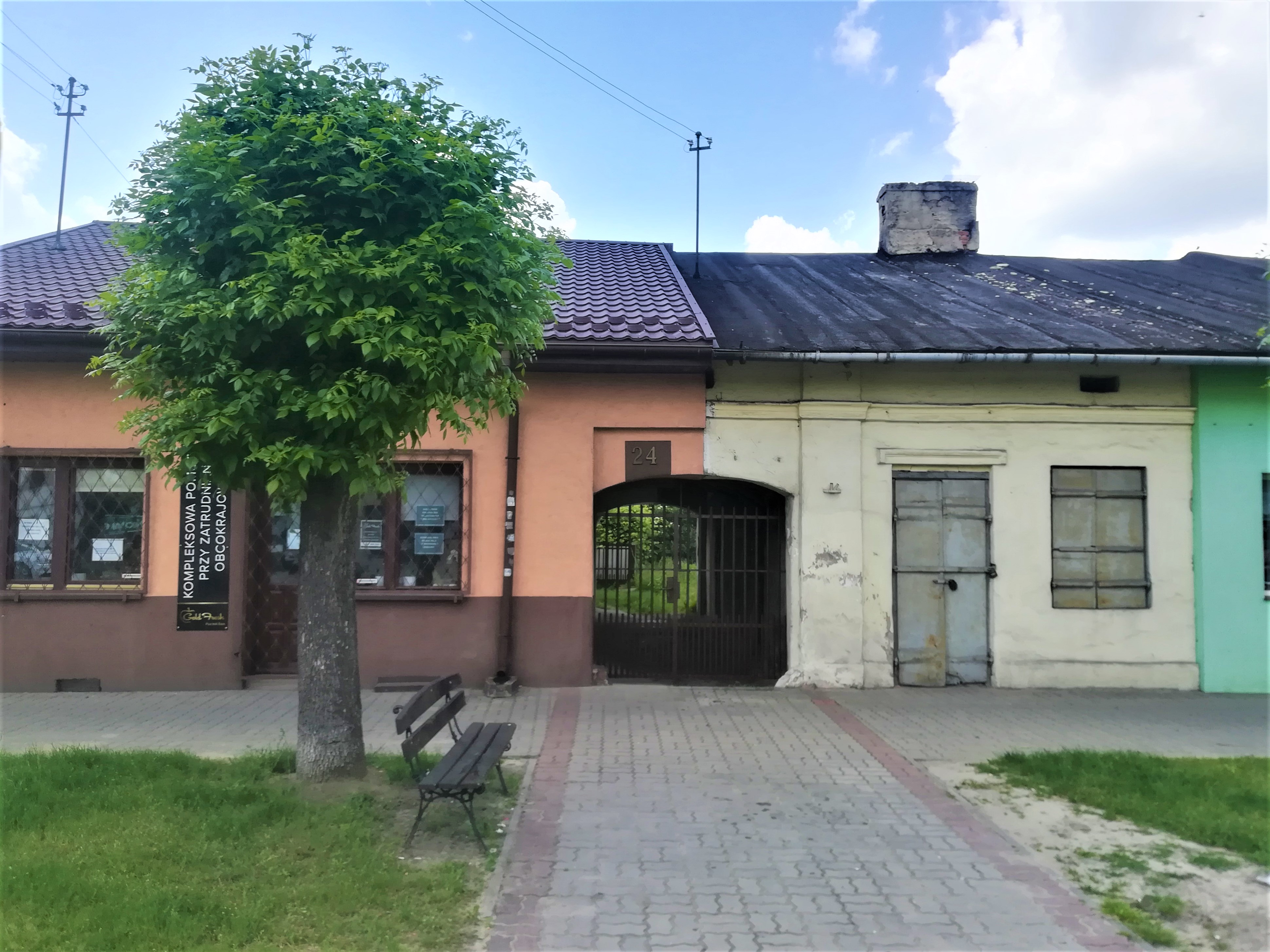 Widok miejski z Białej Rawskiej.